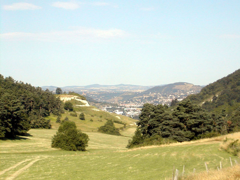 Le Centre Culturel Municipal de la Commune